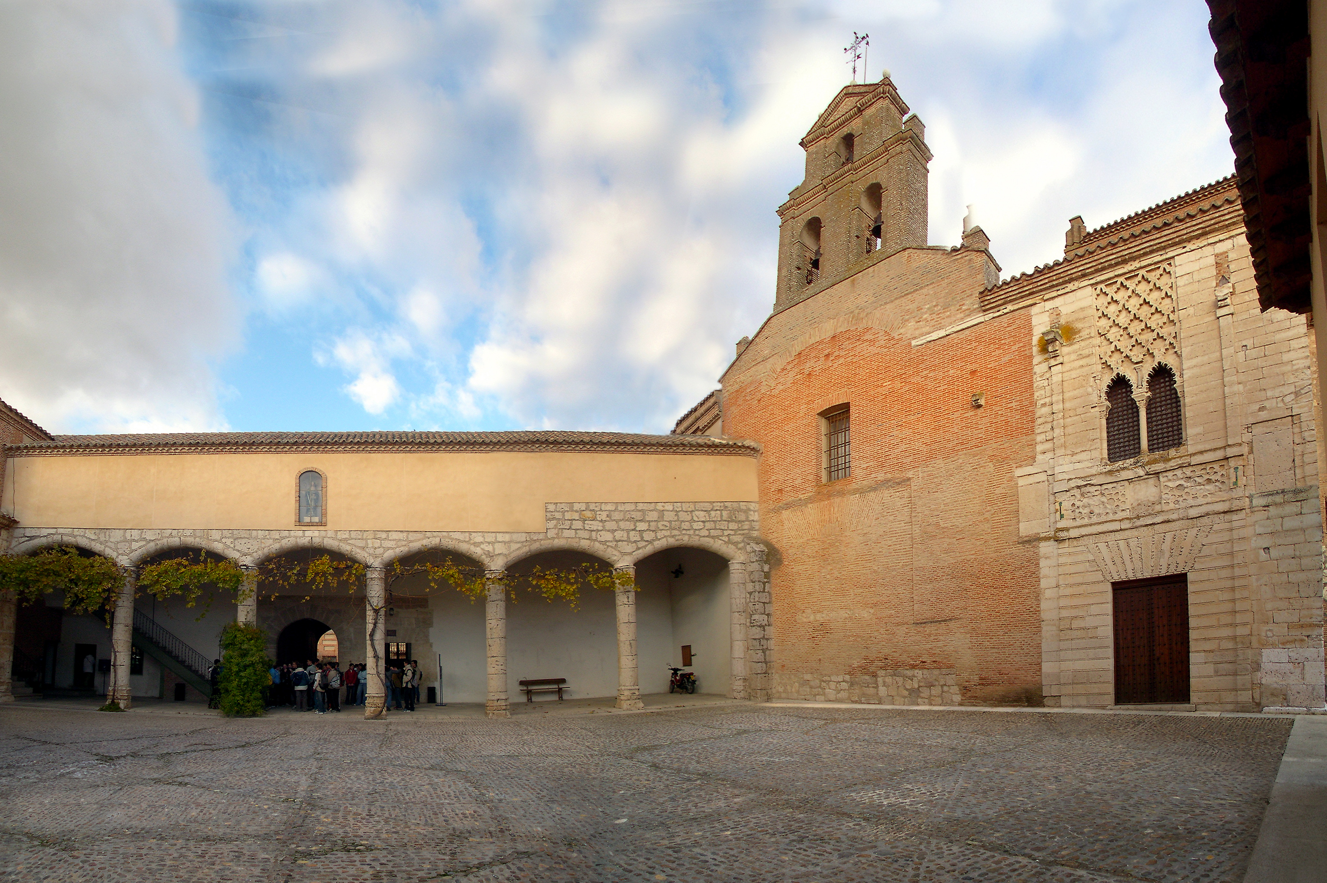 Atrio de entrada alre al monasterio-palacio de Las Claras, en tordesillas (Valladolid, España)